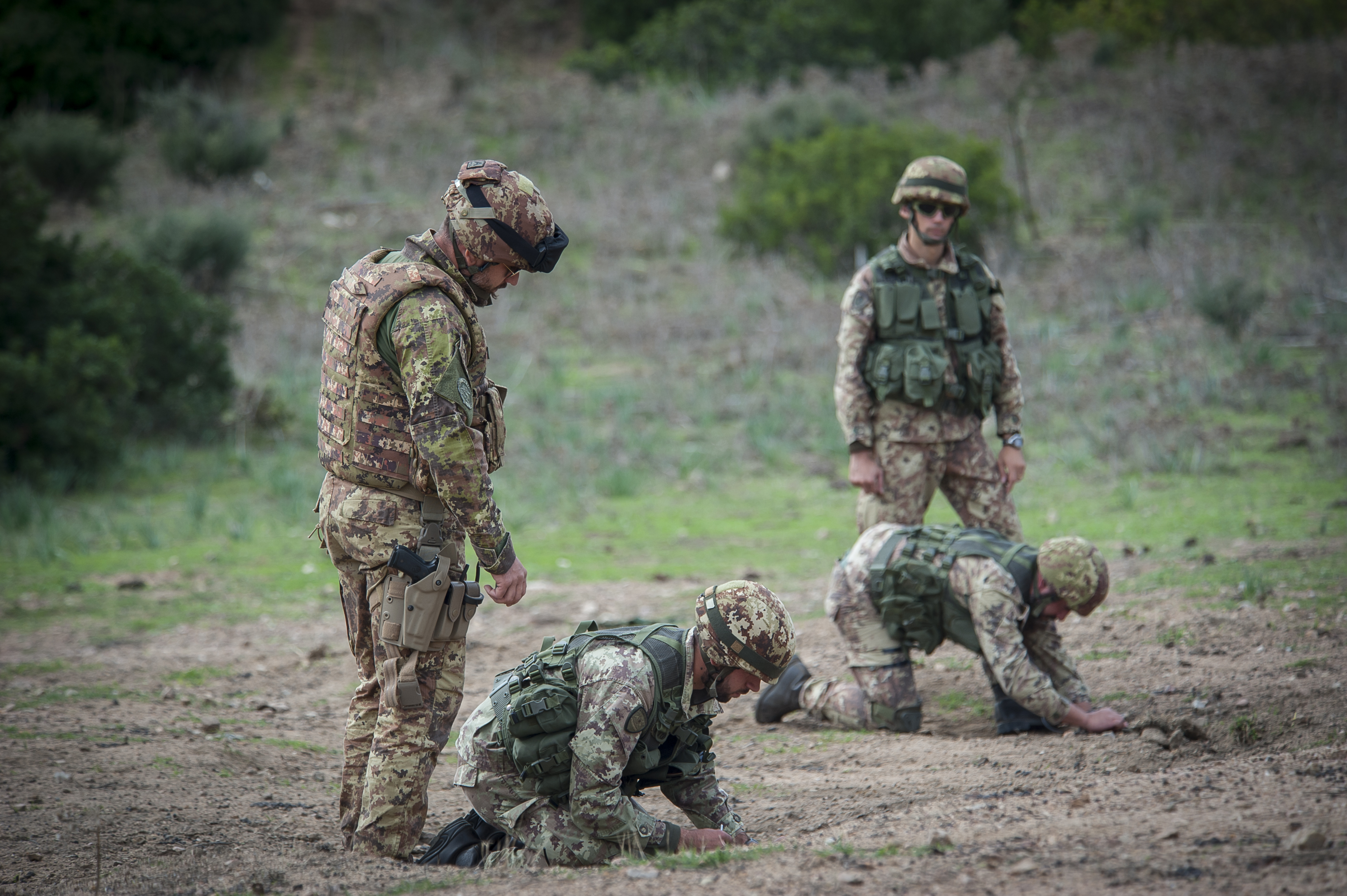 NATO Local PAO Capo Teulada Live Execercise Trident Juncture 2015 - 5° Regimento Genio Guastatori e 1° Reggimento San Marco durante addestrameto EOD. . . NATO Local PAO Capo Teulada Esercitazione Trident Juncture 2015 - 5° Engineer Regiment and 1° San Marco Regiment during EOD training